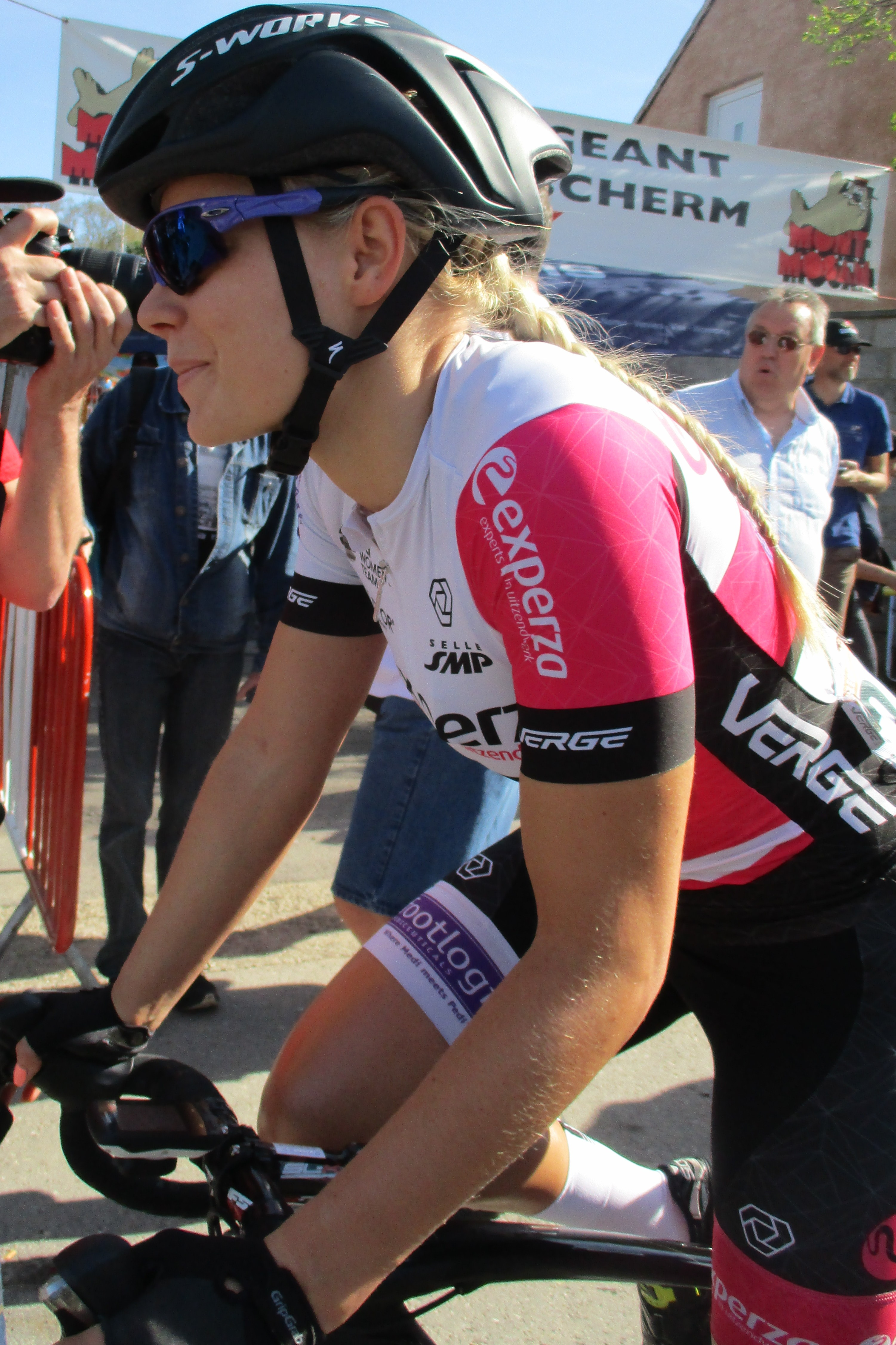 Start van de Waalse Pijl 2018 op de Mur van Huy.